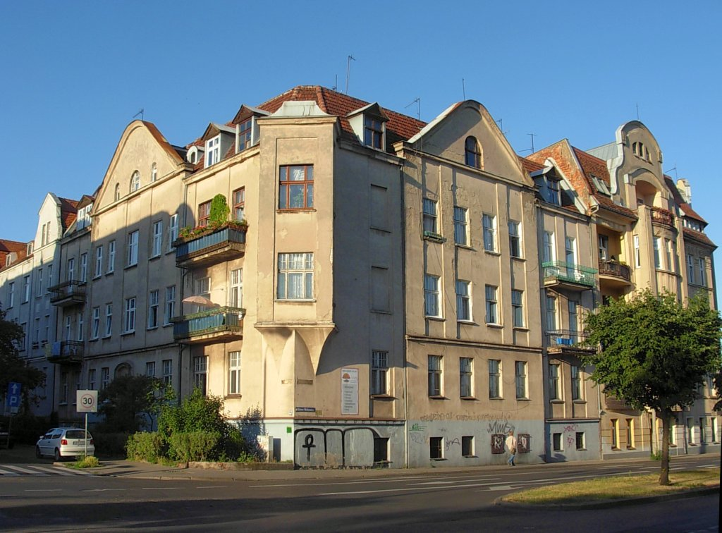 Aleja Adama Mickiewicza w Bydgoszczy